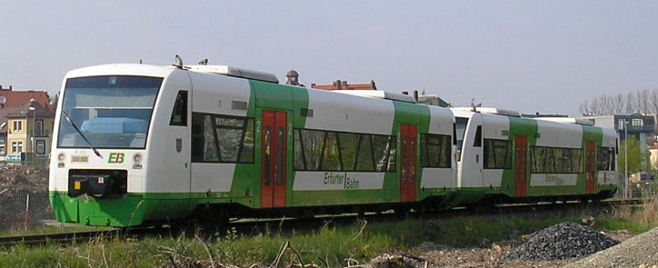 Bahn. Dieser Zug ist auf den Namen "Luftkurort Stützerbach" getauft.